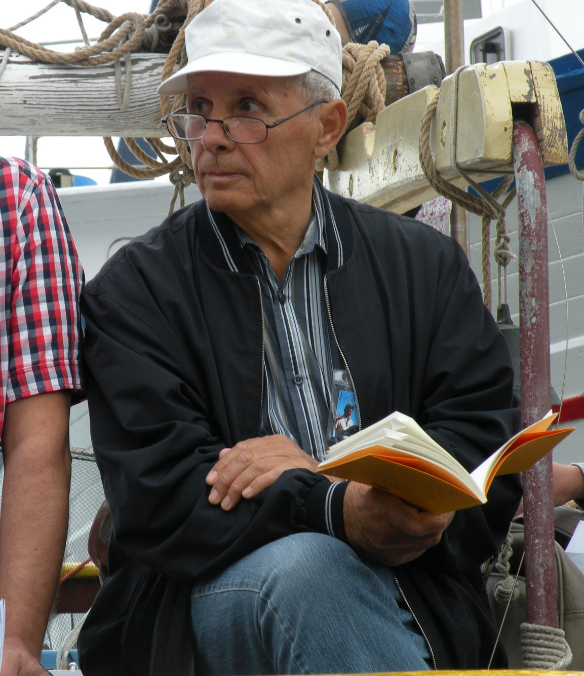 Ali Podrimja au festival de poésie Voix Vives à Sète (France) 25 juillet 2011